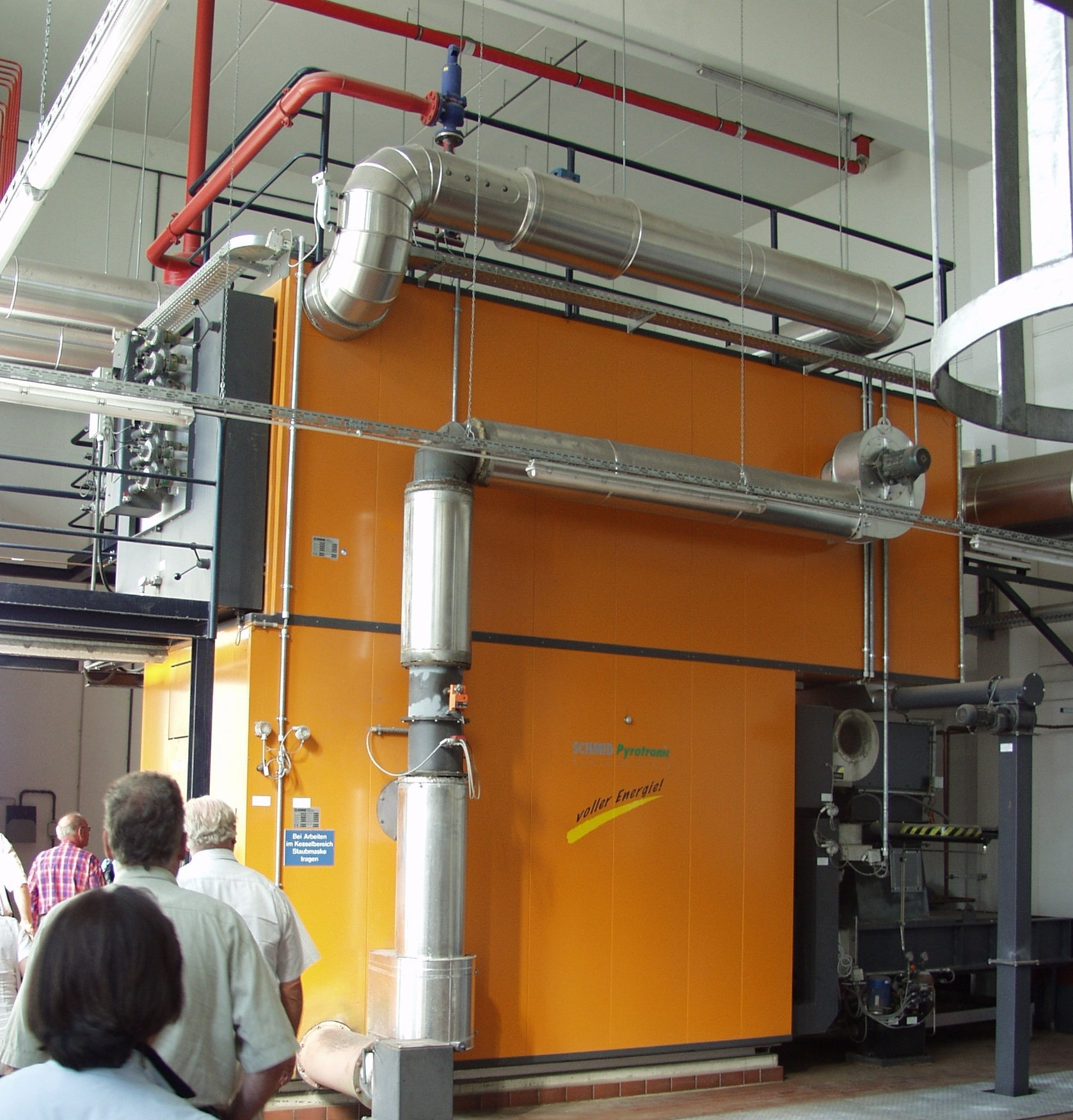 Holzhackschnitzelheizwerk der Energie und Wasser Lübeck GmbH, Carl-Gauß-Straße, Lübeck. Leistung: 2 MW